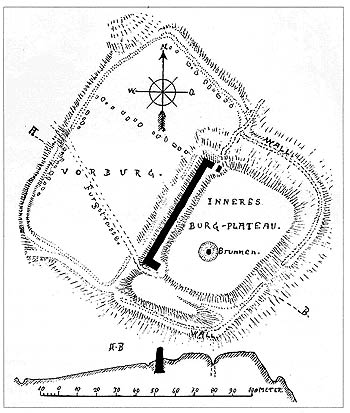 1922 - 1926 Karl von Löwis of Menari poolt koostatud linnuseplaan.